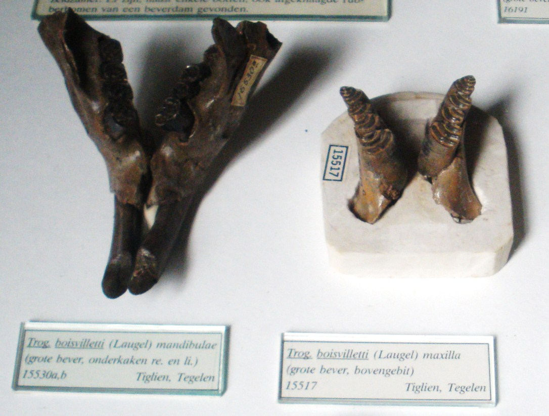 Fossil of Trogontherium, an extinct beaver - Took the photo at Teylers Museum, Haarlem